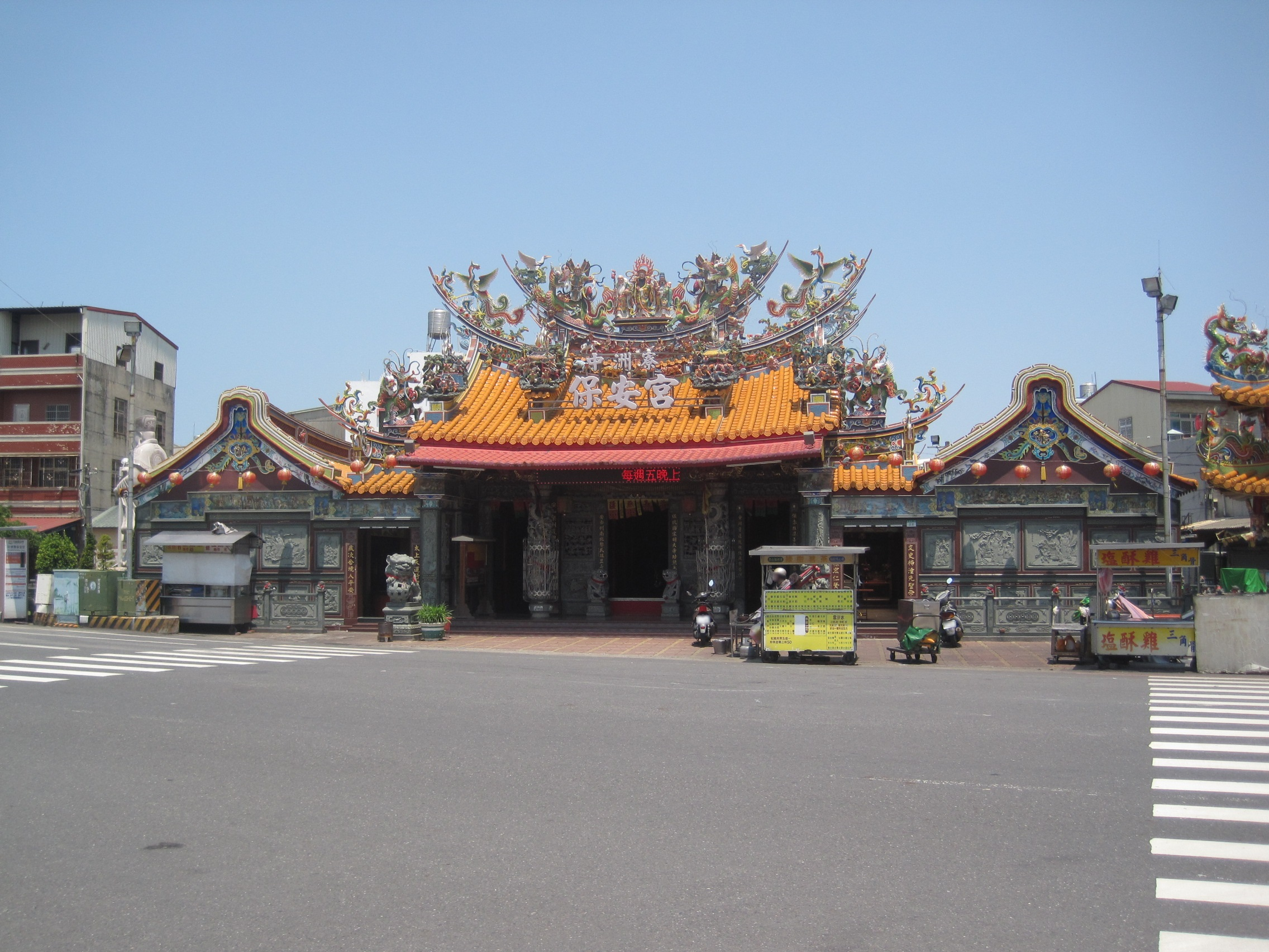 中洲寮保安宮